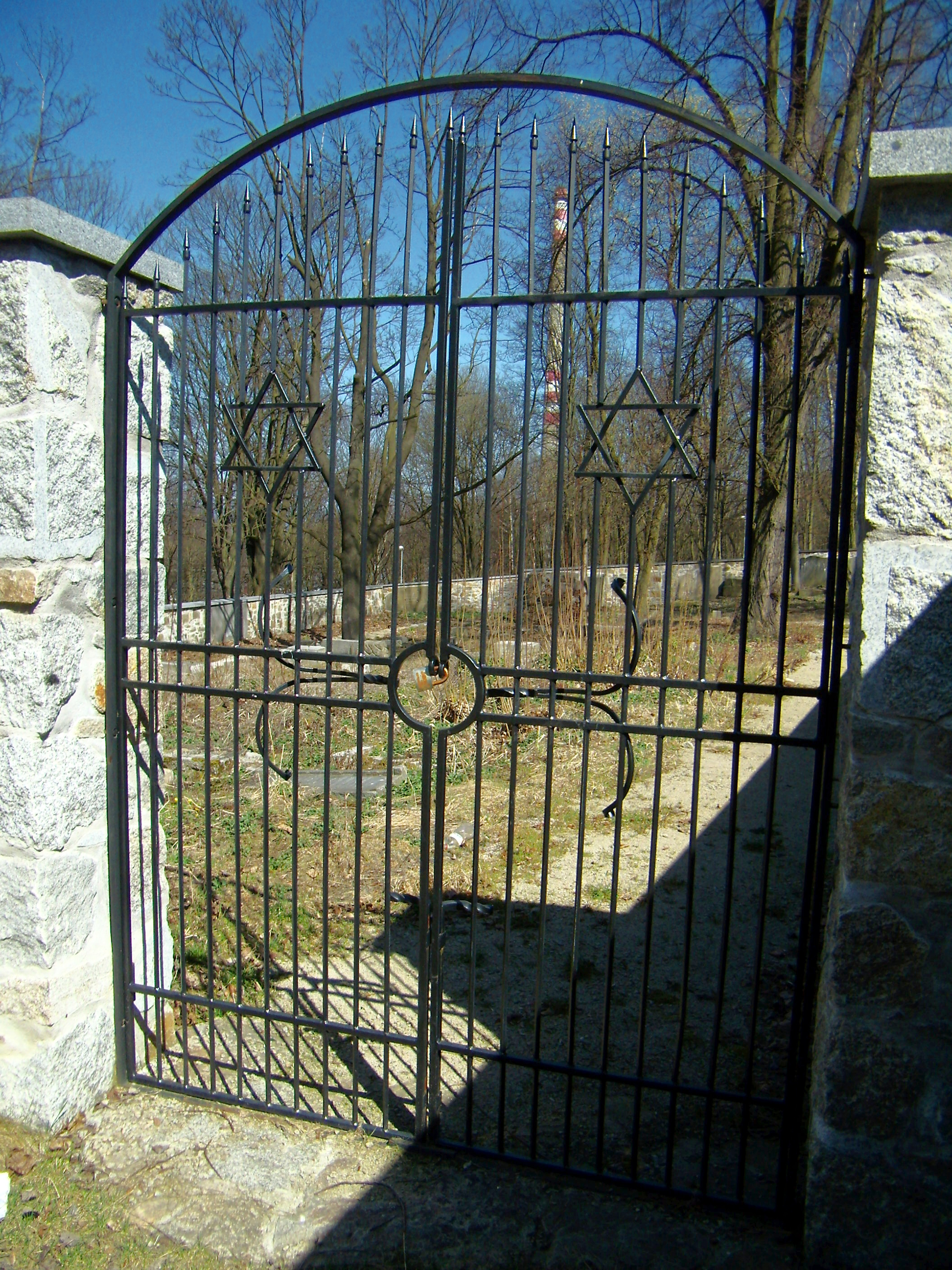 Židovský hřbitov Sokolov